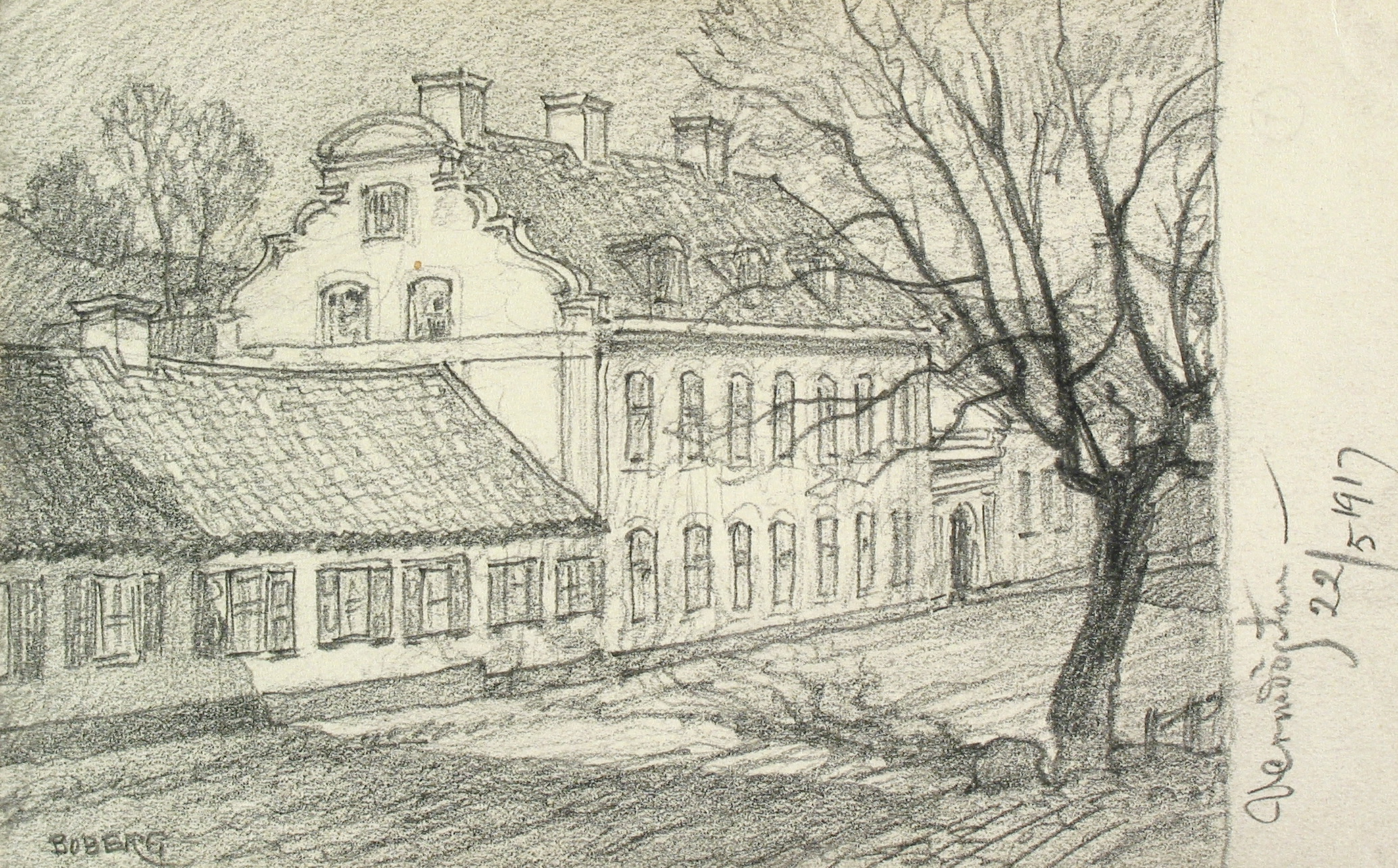 Dagens Malmgårdsvägen 55C